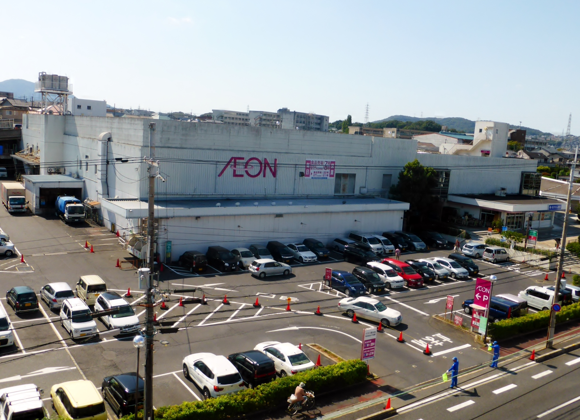 イオン西大和店を撮影。